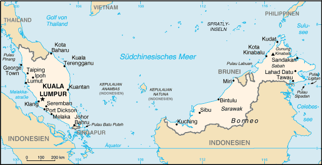 Karte von Malaysia CIA World Factbook